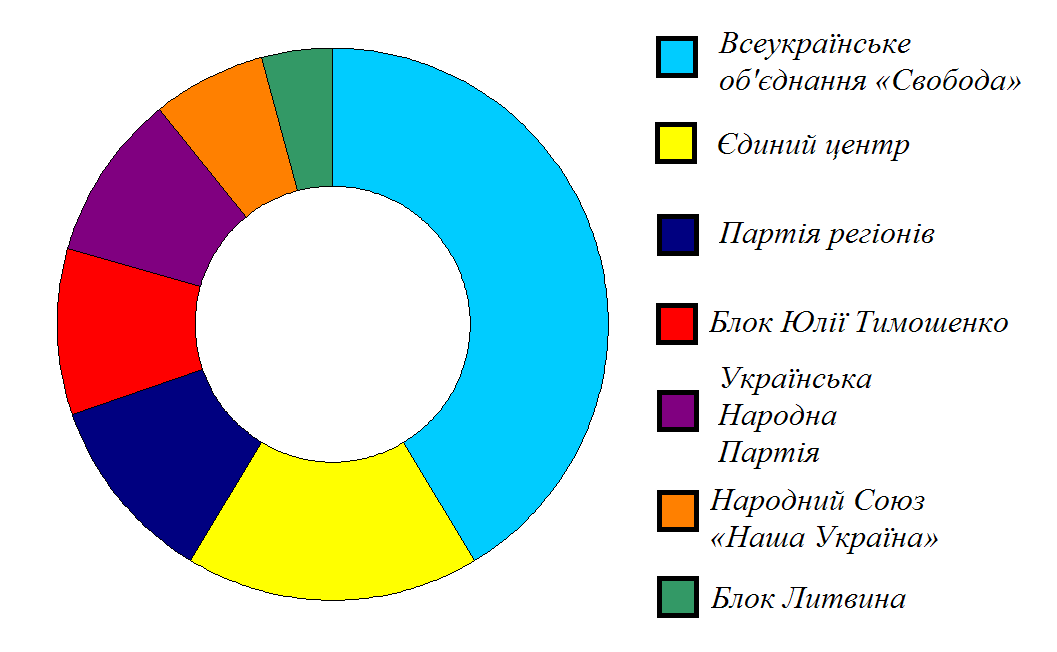 Результати виборів до Тернопільської обласної ради 2009 року